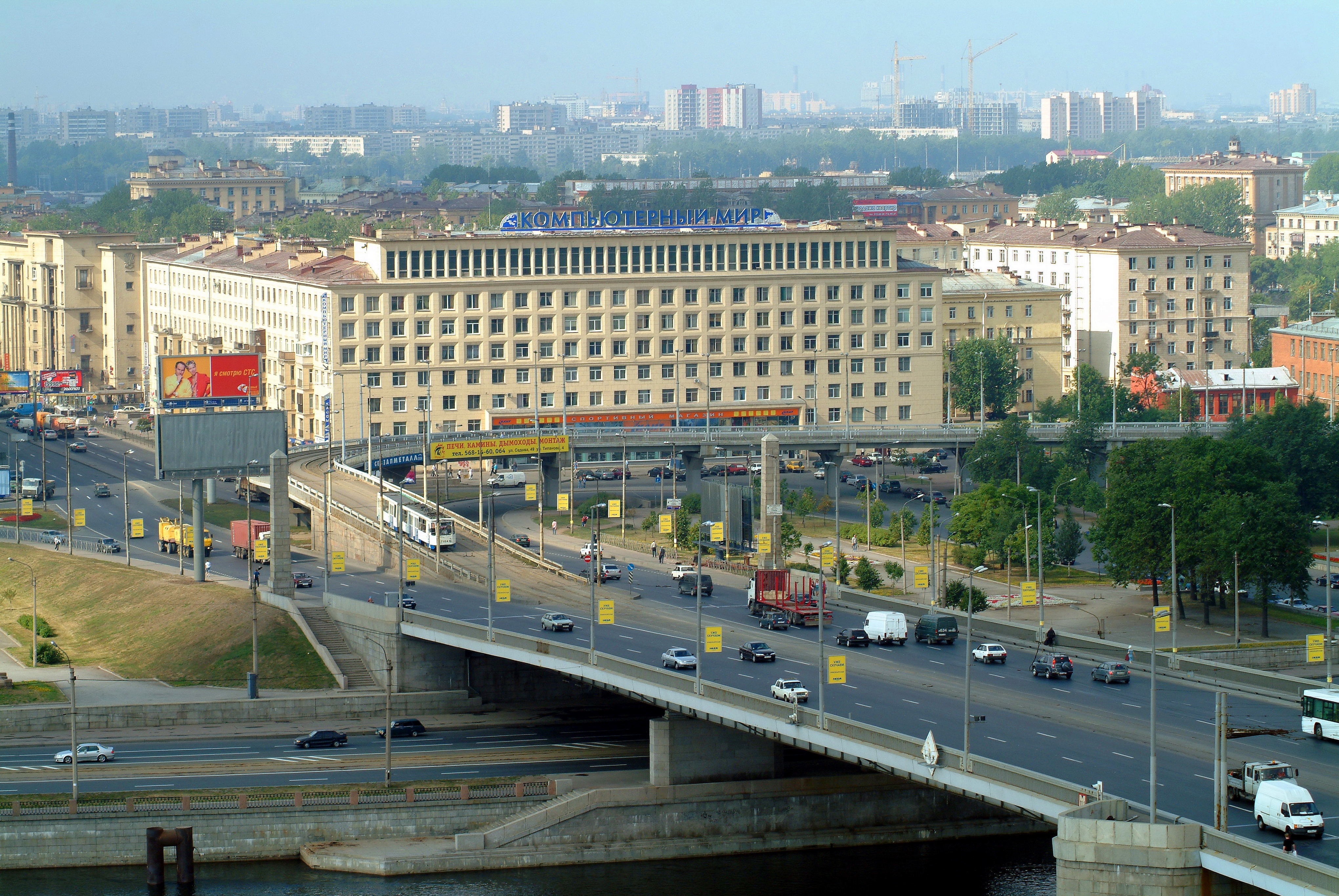 Вид на левый берег Невы и трамвайную эстакаду Володарского моста